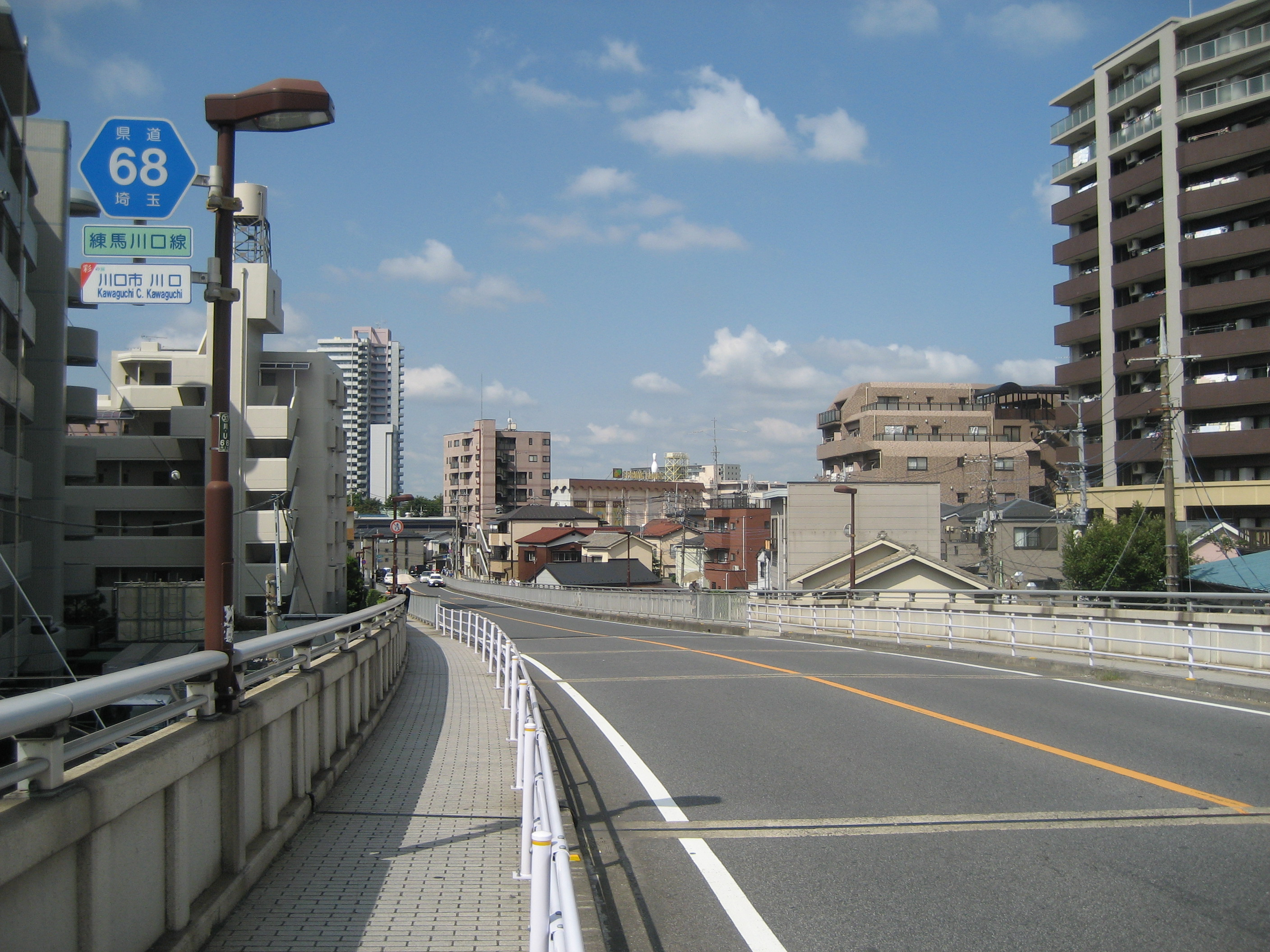 埼玉県道68号線川口市川口陸橋付近